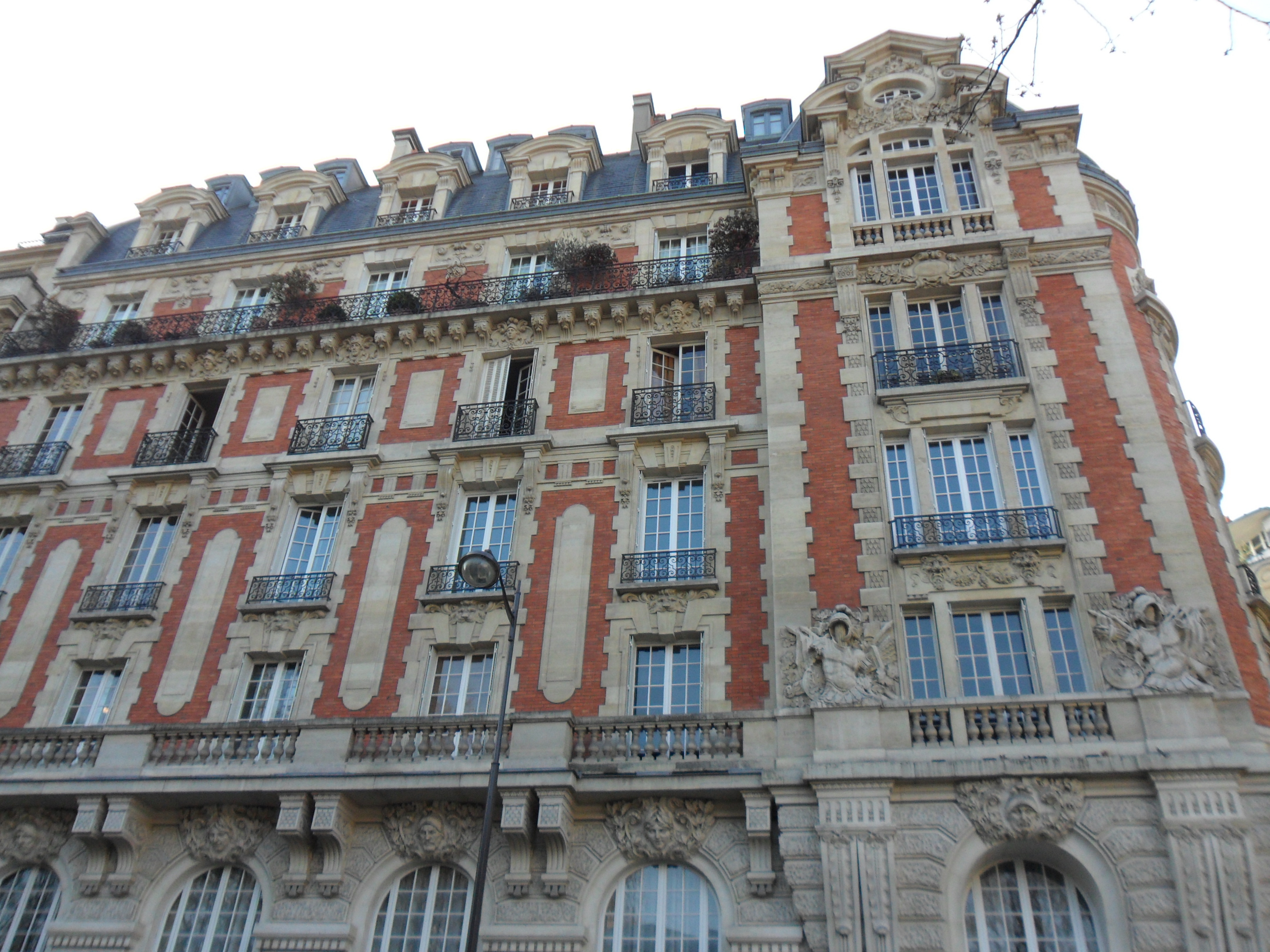 Immeuble à l'angle de la rue Guynemer (n° 2) et la rue de Vaugirard (n° 21), VIe arrondissement, Paris, France. Facade sur la rue Guynemer.